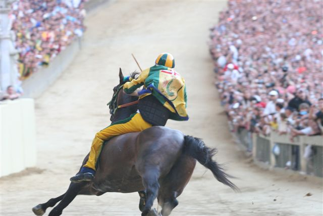 Un momento della corsa del Palio dell'Assunta 2008 vinto dal Bruco.